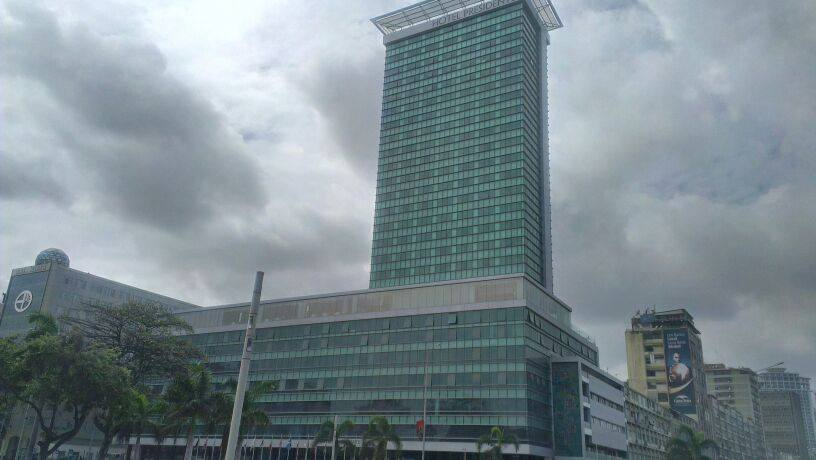 Foto do Hotel President Meridien em Luanda